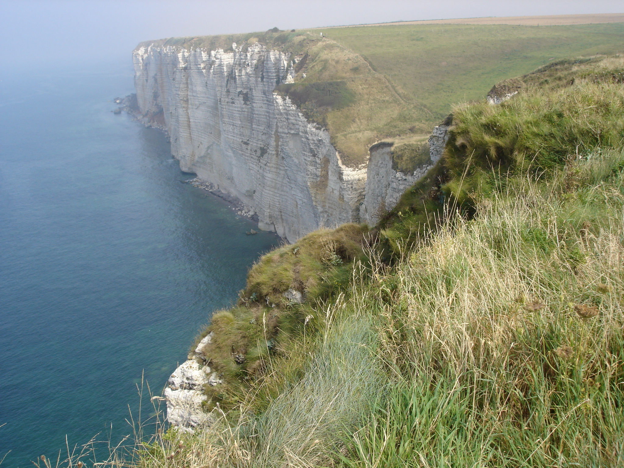 Les falaises autour de la valleuse du Curé à Bénouville (Seine-Maritime) en 2005 -- Photo amateur prise par moi-même.